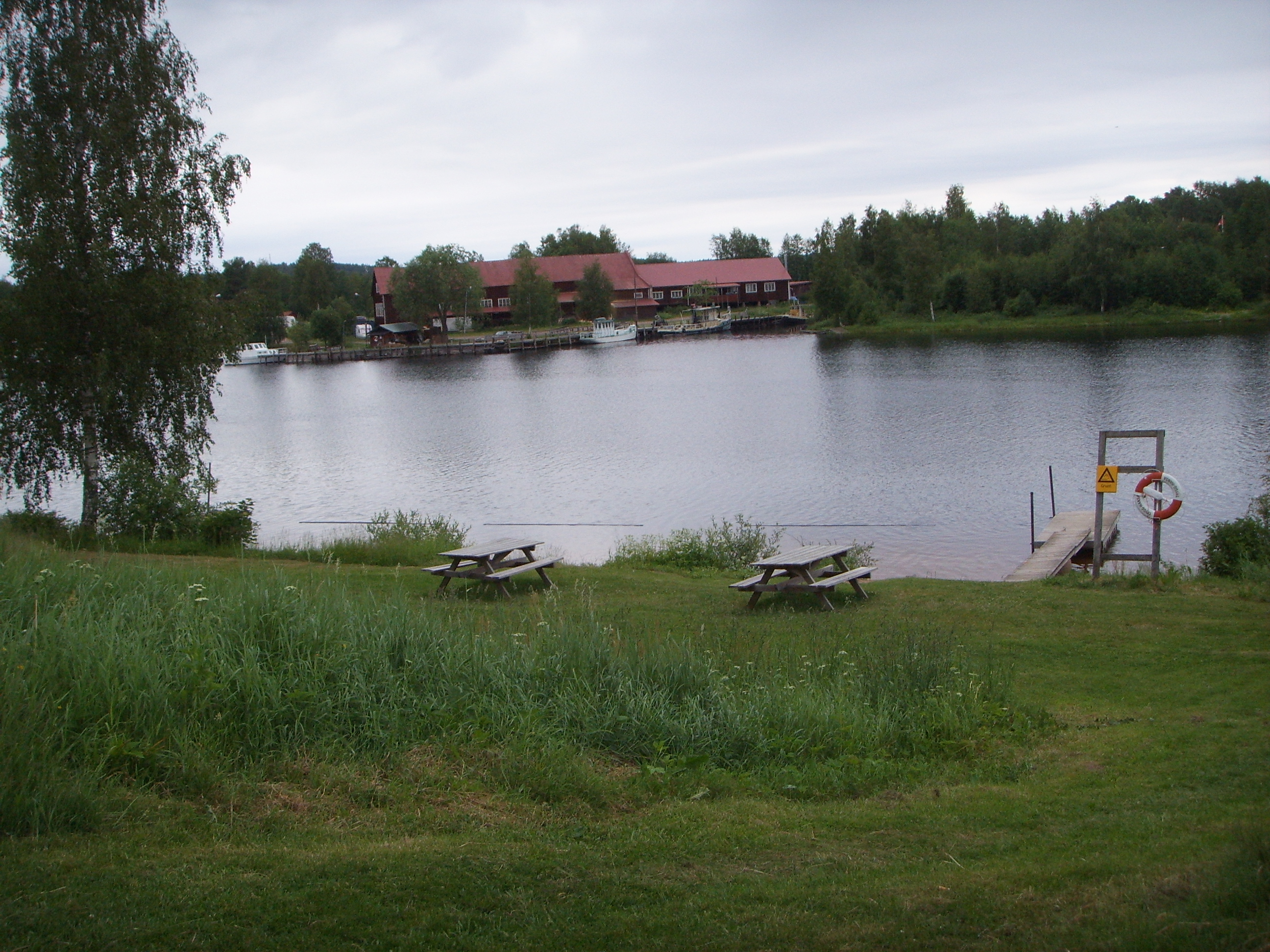 Övermo badplats midsommar 2007